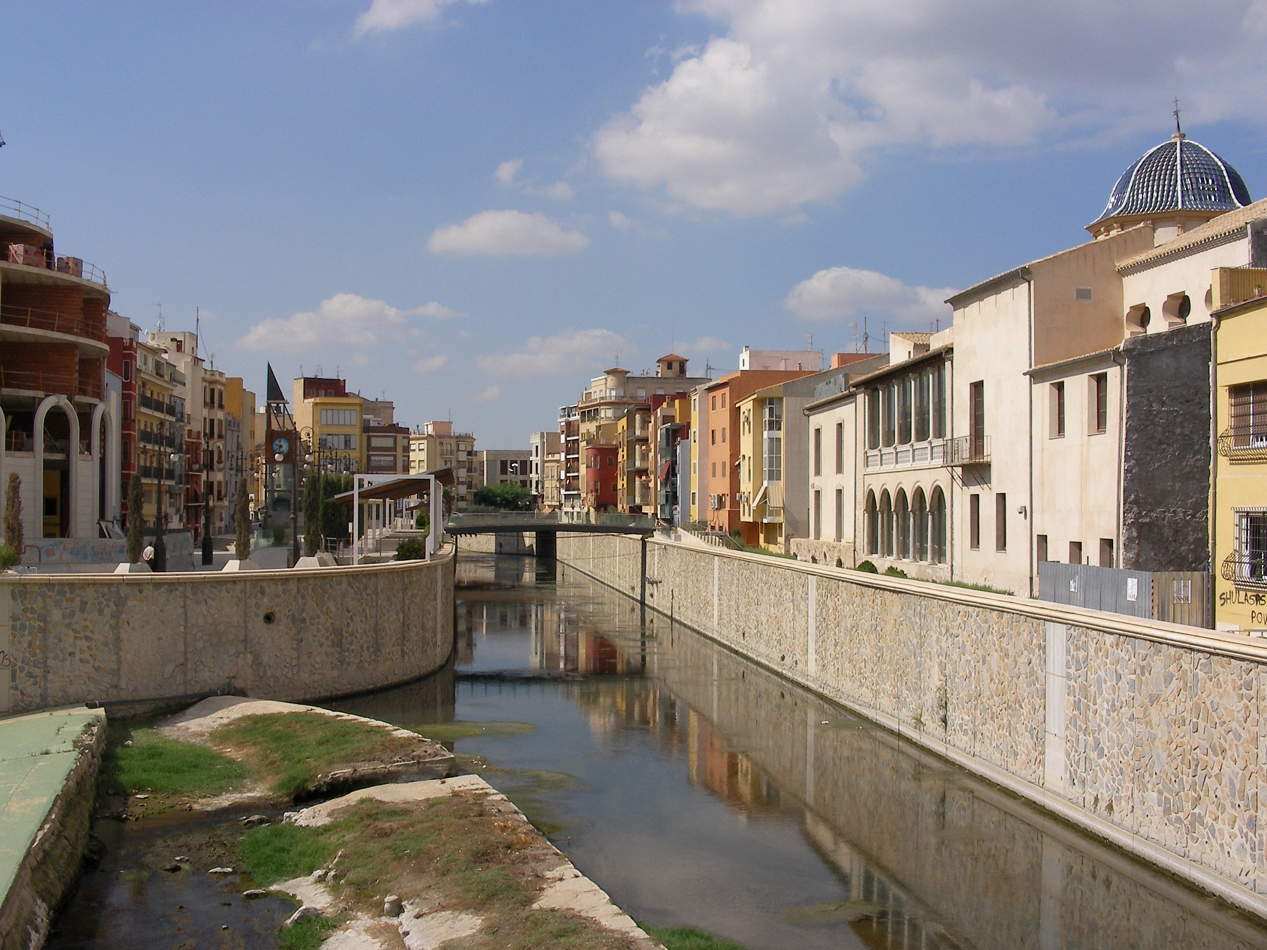 Am Fluß Segura in Orihuela (Spanien)